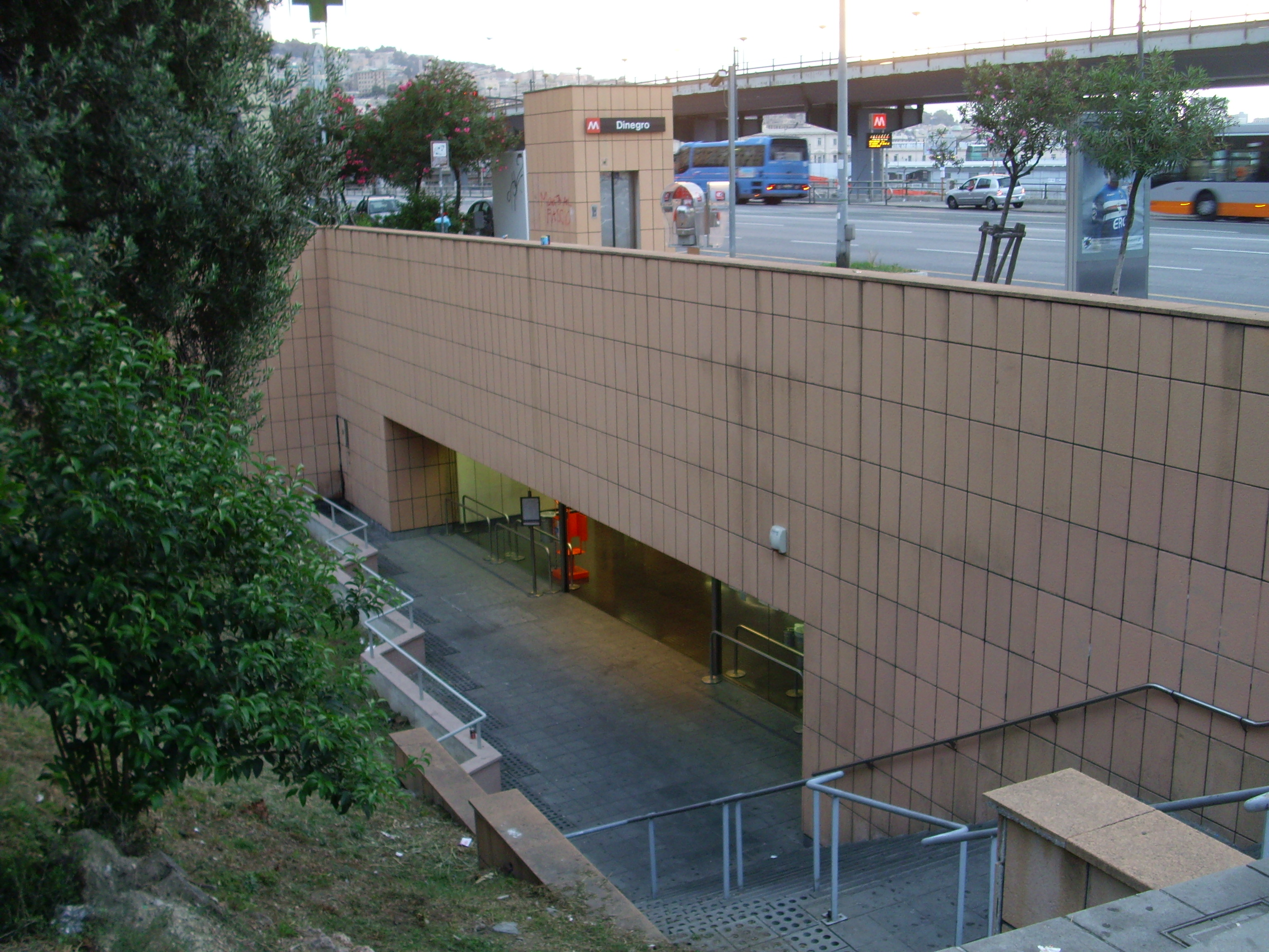 Ingresso della stazione di Dinegro della Metropolitana di Genova